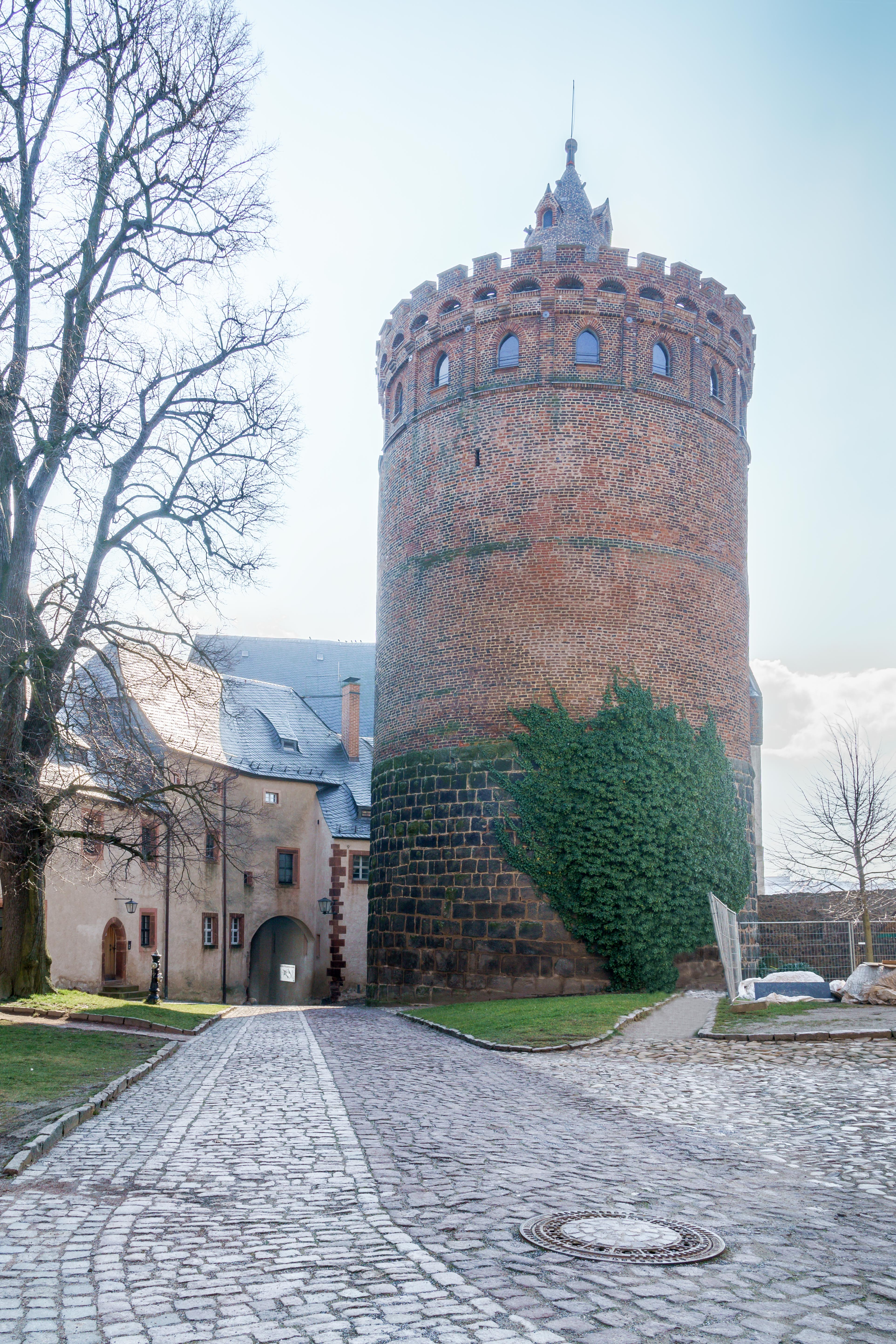 Bergfried Burg Mildenstein in Leisnig